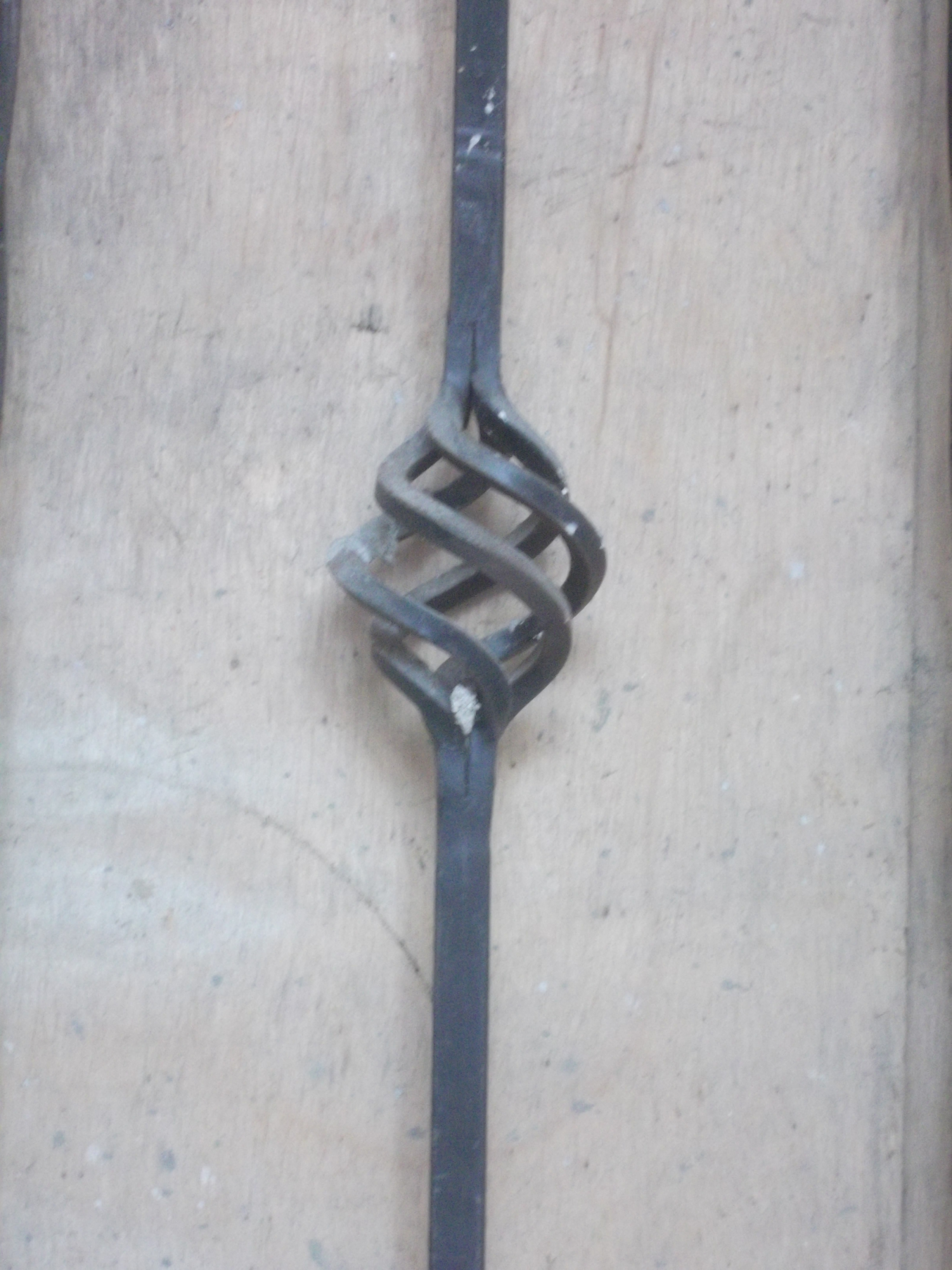 Antigo Hotel Nacional, Porto Alegre, Brasil